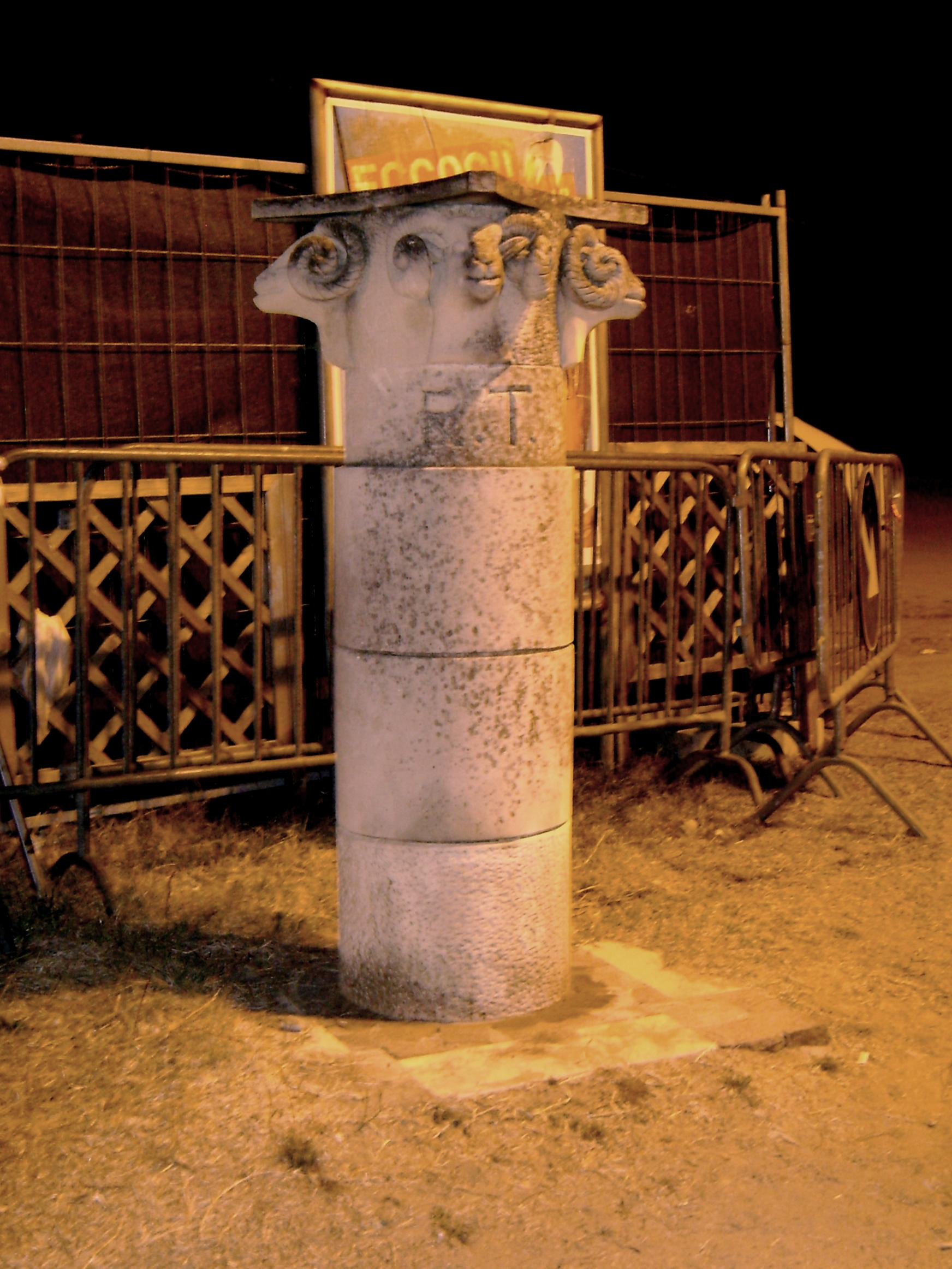 Colonna del tratturo a Casalbordino, Chieti.